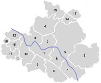 Dresden - Administrative areas: 1. Altstadt 2. Neustadt 3. Pieschen 4. Klotzsche 5. Loschwitz 6. Blasewitz 7. Leuben 8. Prohlis 9. Plauen 10. Cotta 11. Altfranken 12. Cossebaude 13. Gompitz 14. Langebrück 15. Mobschatz 16. Oberwartha 17. Schönborn 18. Schönfeld-Weissig 19. Weixdorf